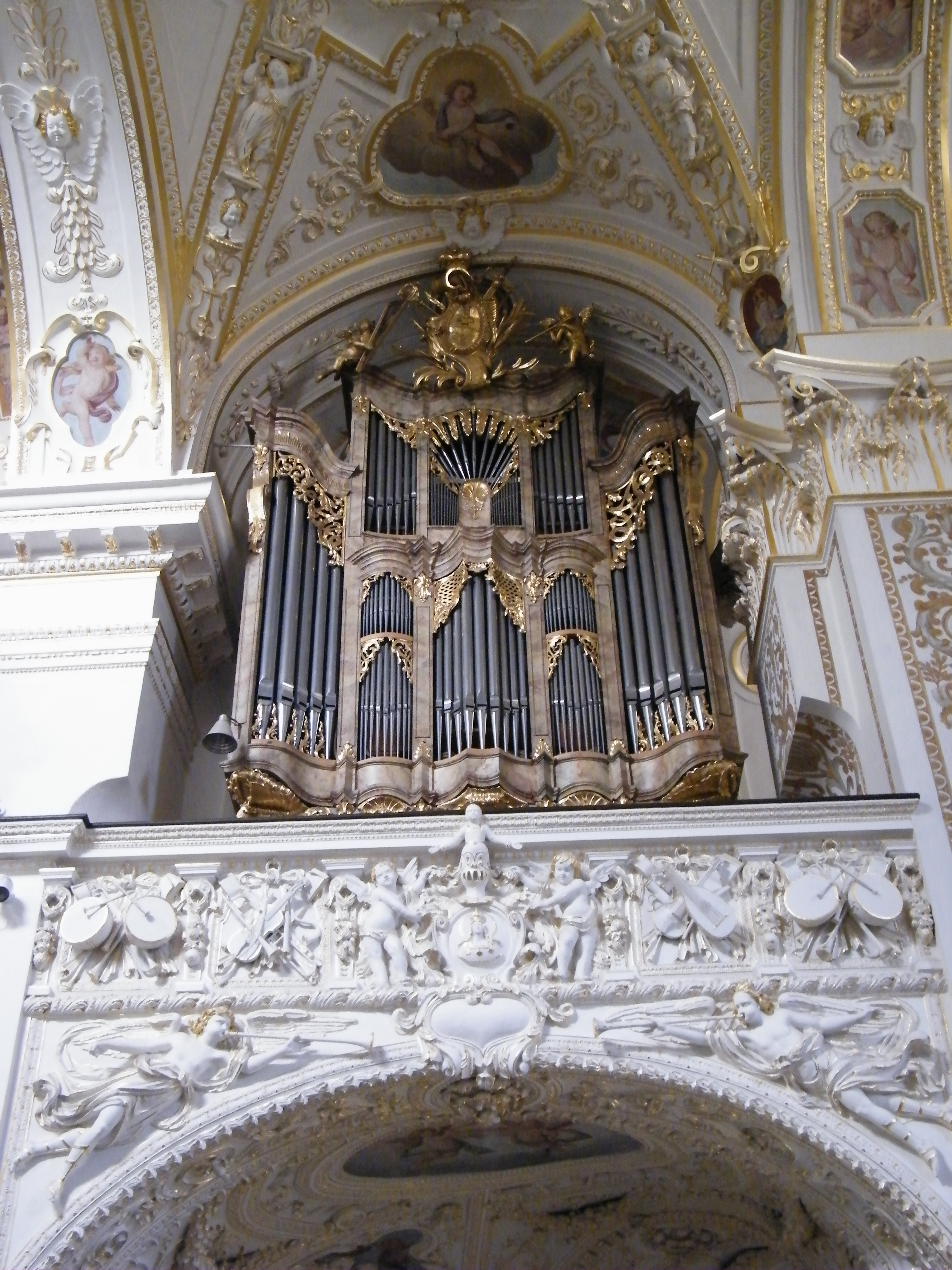 Nebenorgeln in St. Lorenz, Kempten